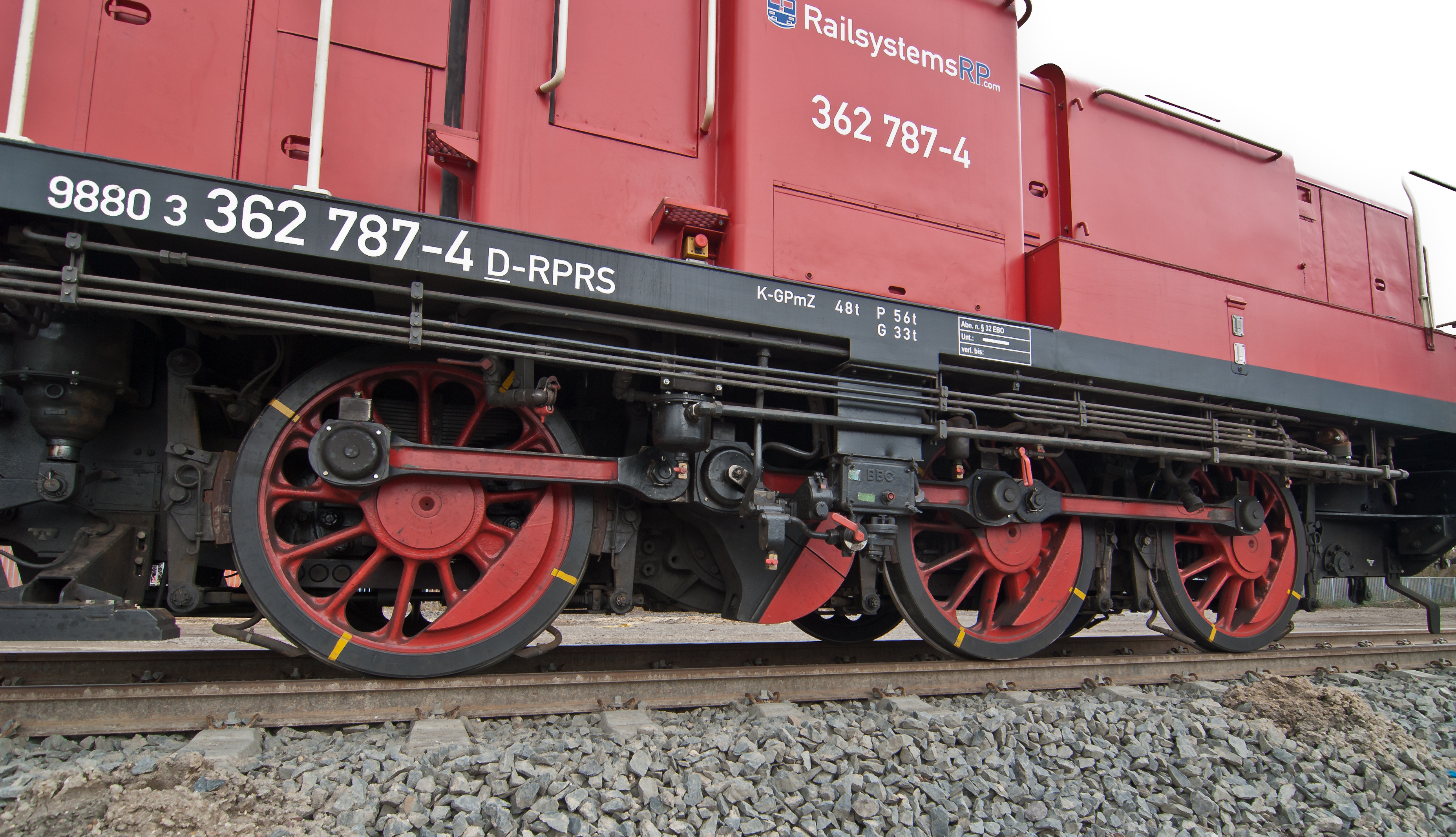 Fahrwerk der 362 787-4